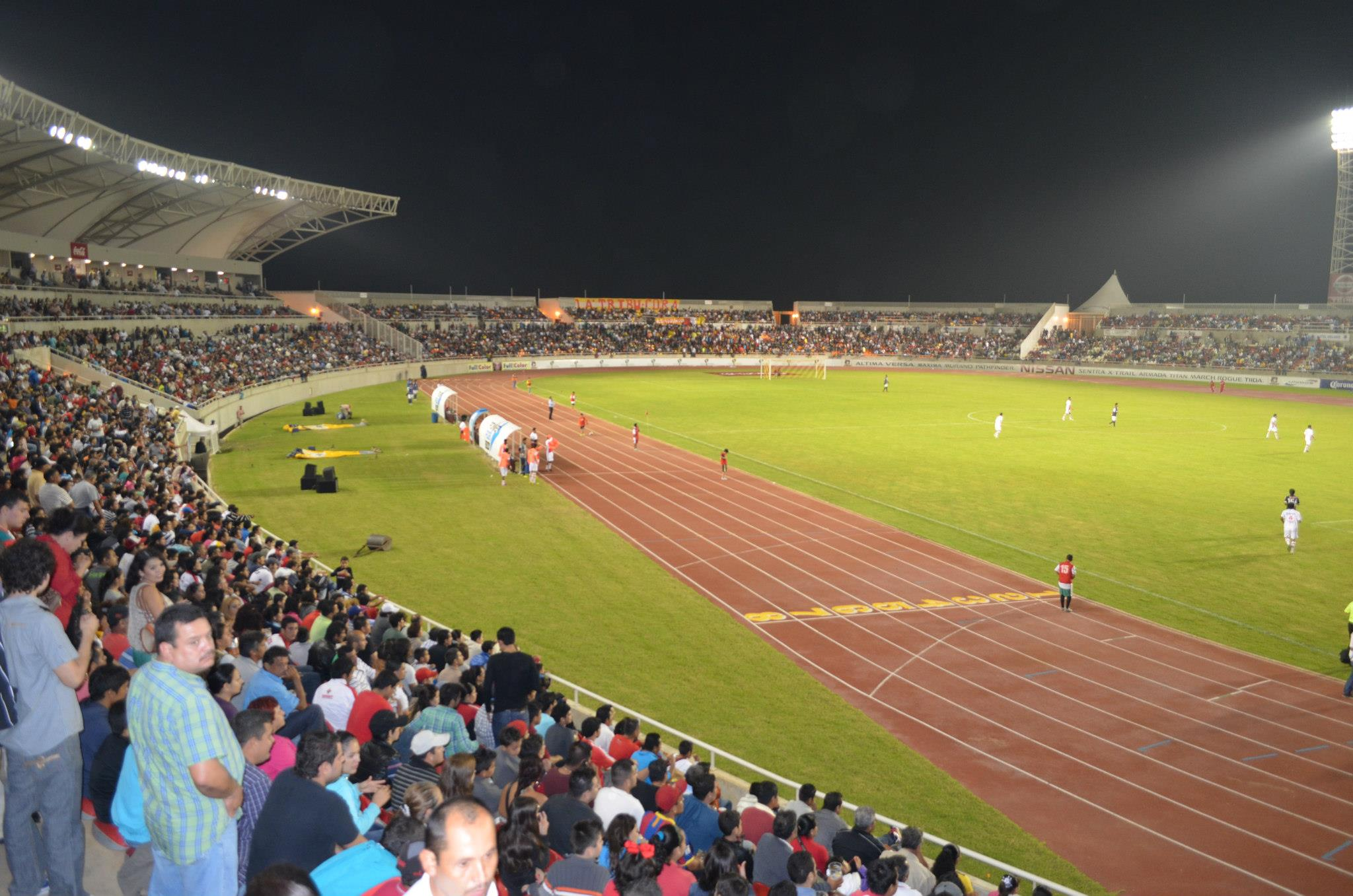 Máxima capacidad en el Estadio Arena Cora de la ciudad de Tepic, Nayarit.